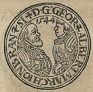 Ausschnitt aus dem Blatt: Münzvorderseite von 1544 mit den Markgrafen Georg und Albrecht Alcibades